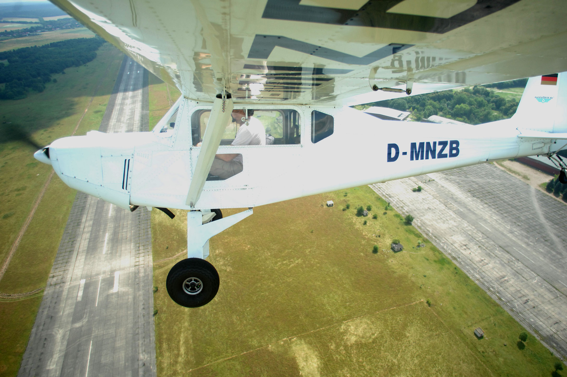 Ultraleichtflugzeug WT 01 Ganzmetall Spornradvariante